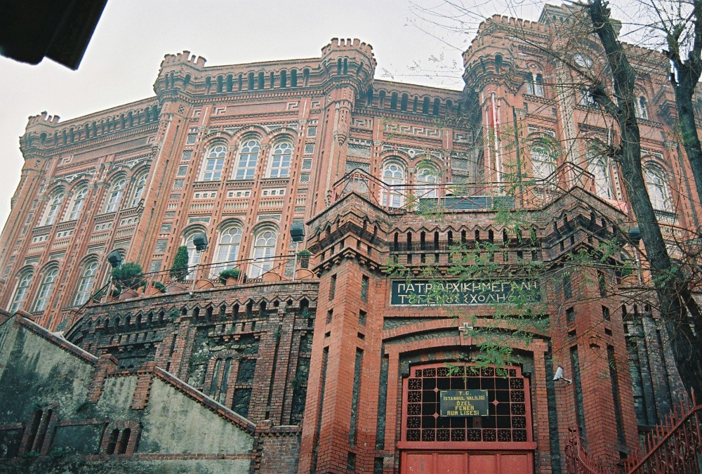 Fener Rum Lisesi, 2005. Bana ait bir resimdir.